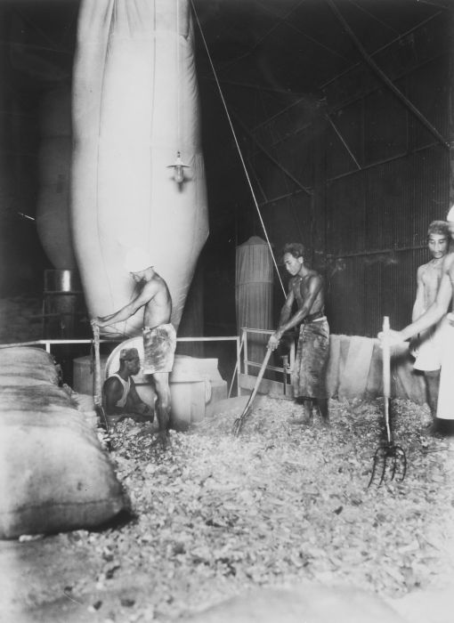 foto. Gedroogde cassave (gaplek) in een loods te Soerabaja waar het wordt gemalen